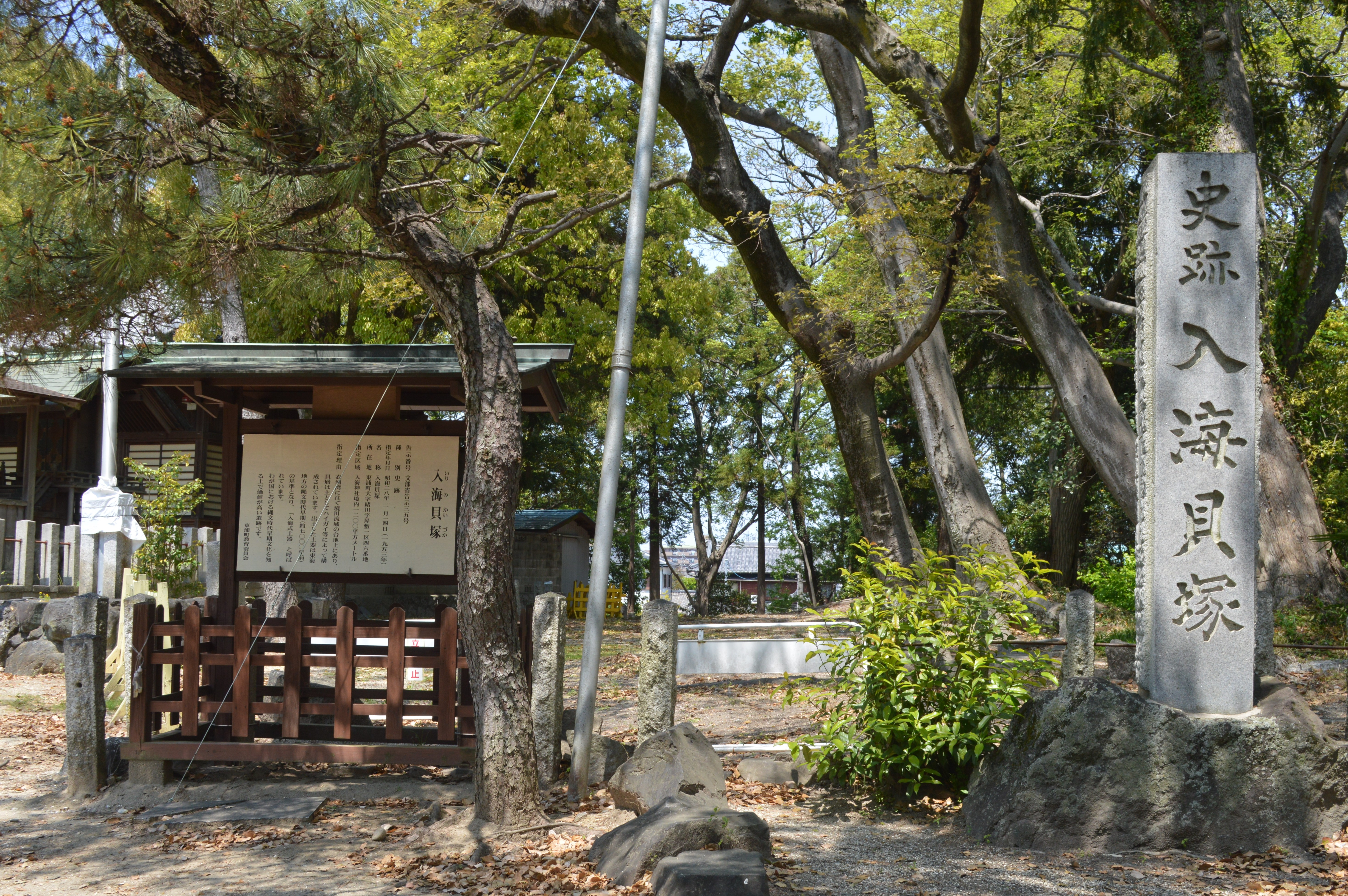 愛知県知多郡東浦町大字緒川屋敷壱区48の入海神社境内にある入海貝塚。国指定史跡。